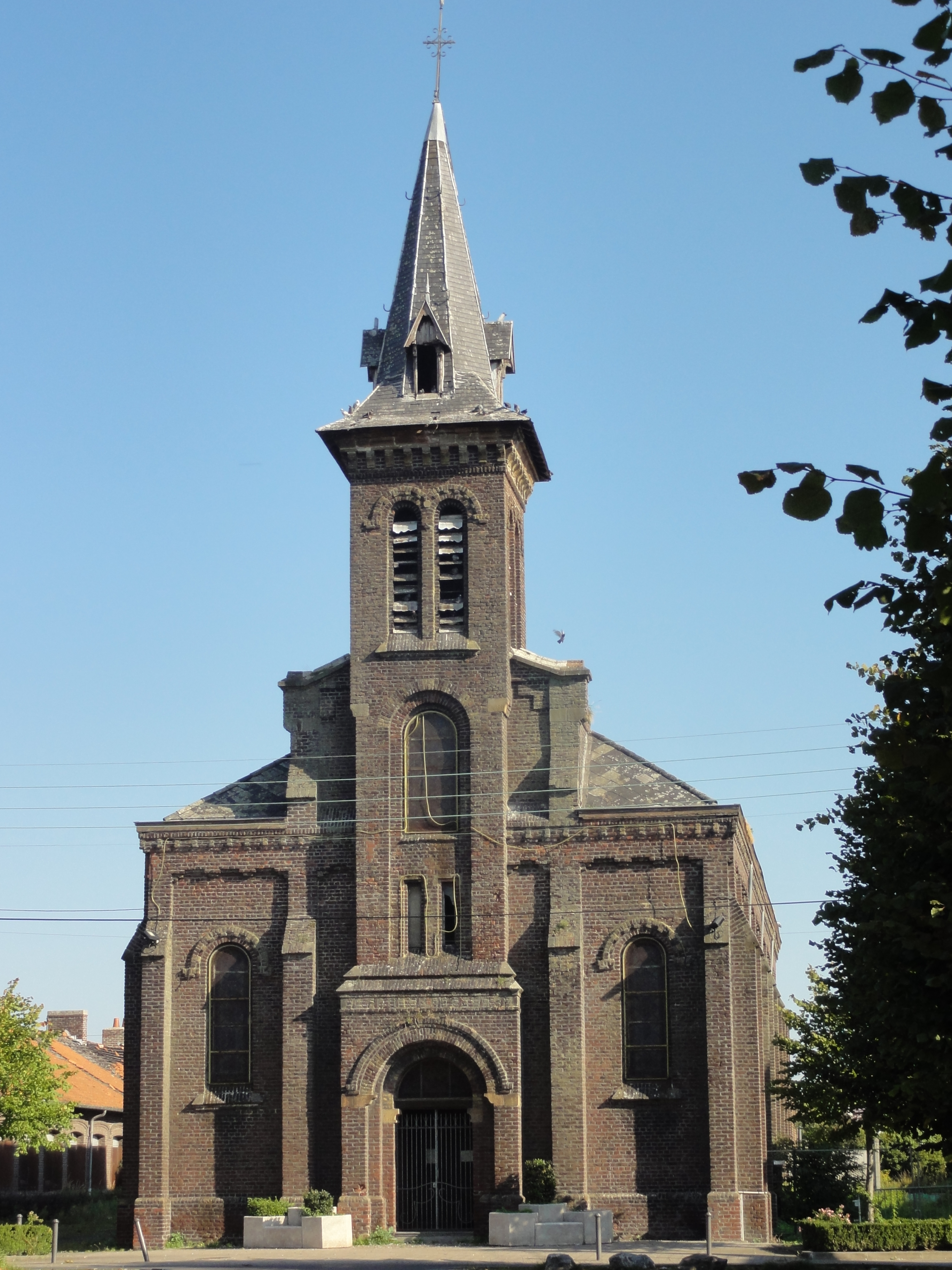 Église Saint-Adolphe des cités de la Fosse Thiers de la Compagnie des mines d'Anzin à Bruay-sur-l'Escaut, Nord, Nord-Pas-de-Calais, France.